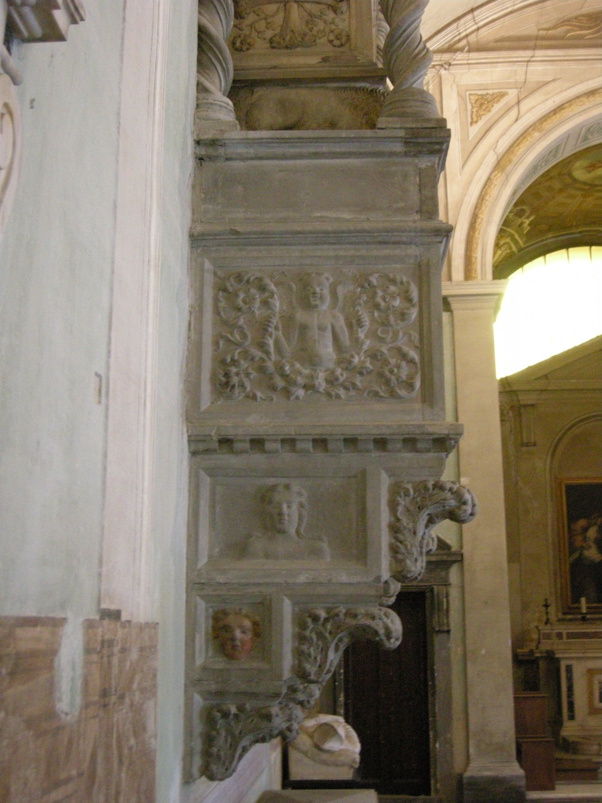 Santo spirito, cappella corsini, tomba di tommaso corsini